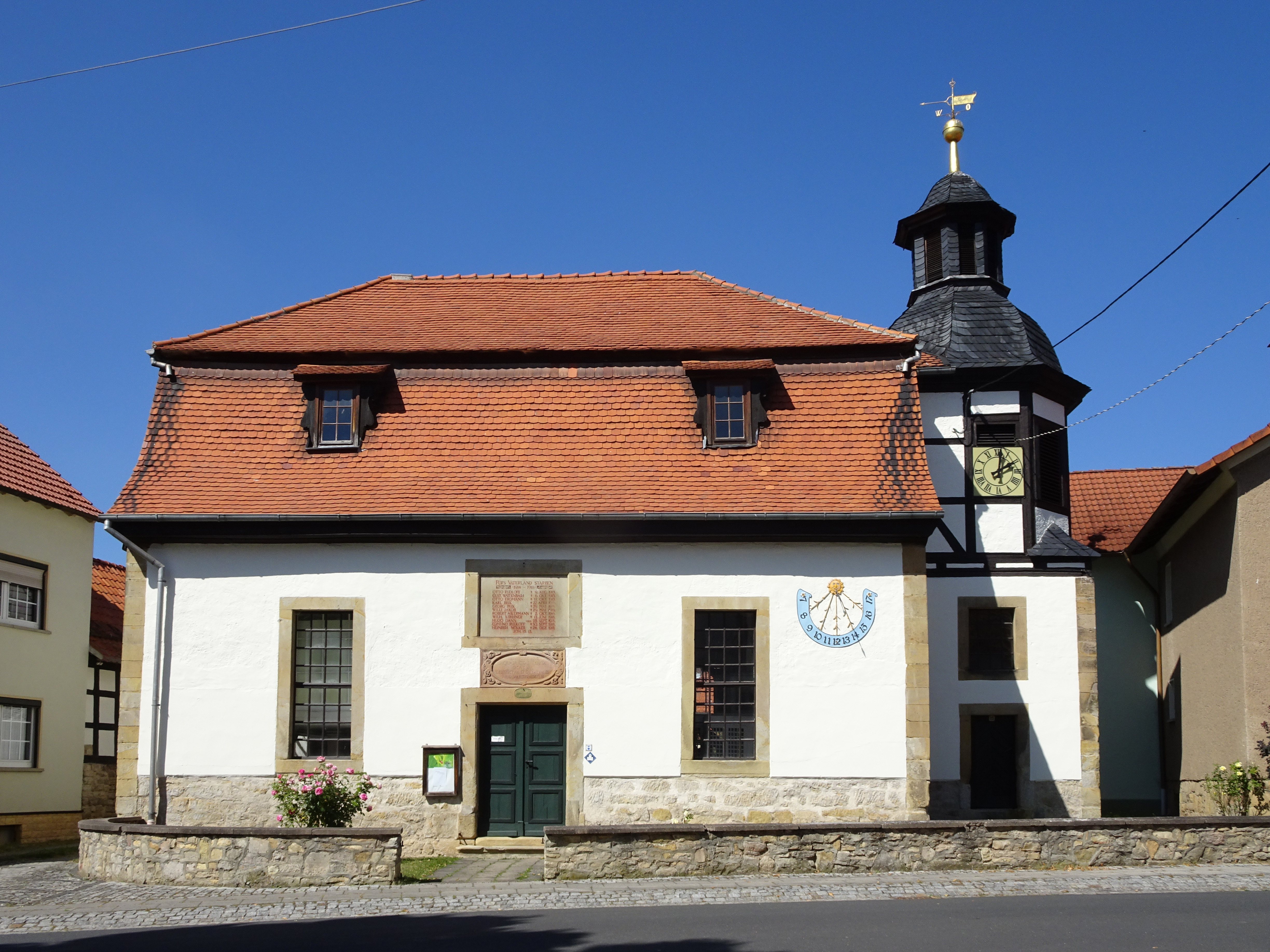 Spichra an der Werra im westthüringischen Wartburgkreis. Die Dreifaltigkeitskirche von 1753. An der Kirche führt der Werratalradweg, der Herkules-Wartburg Radwanderweg, der Elisabeth-Pfad, der Weg der Jakobspilger und der Lutherweg vorbei.